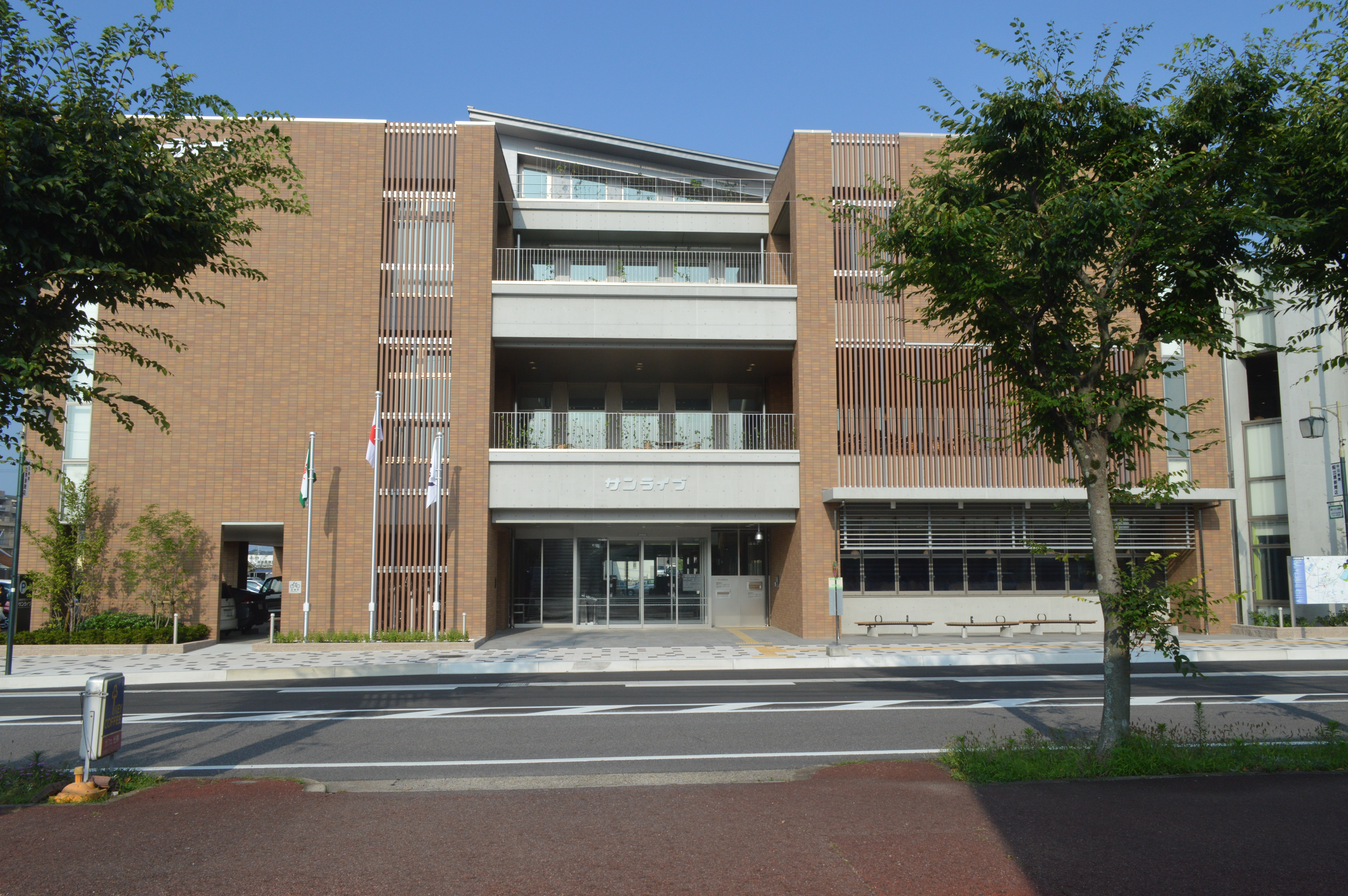 愛知県みよし市にある複合施設、みよし市図書館学習交流プラザ「サンライブ」。みよし市立中央図書館などを内包。